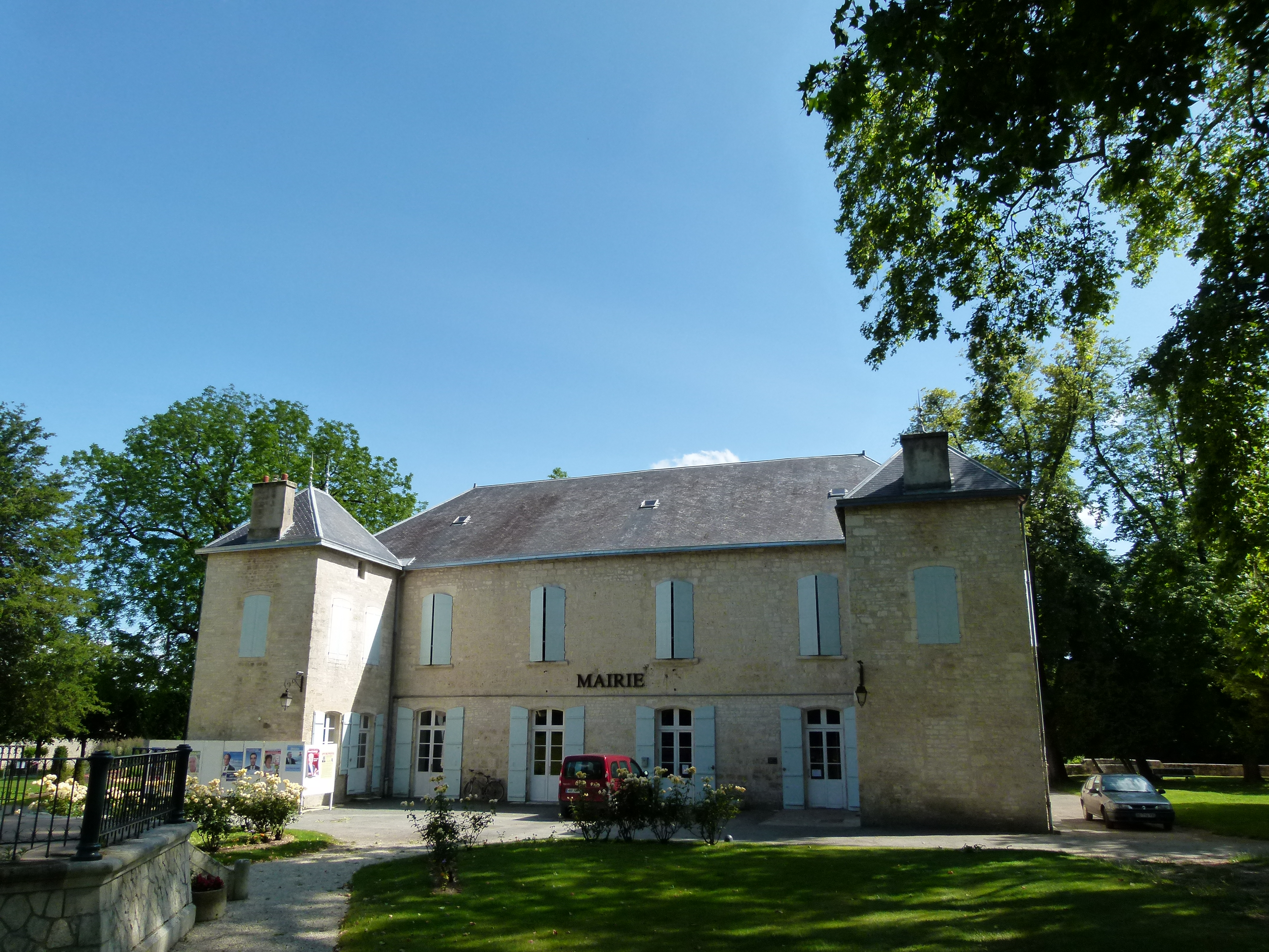 Le Château de Surgères est occupé par la mairie de la ville depuis 1856.